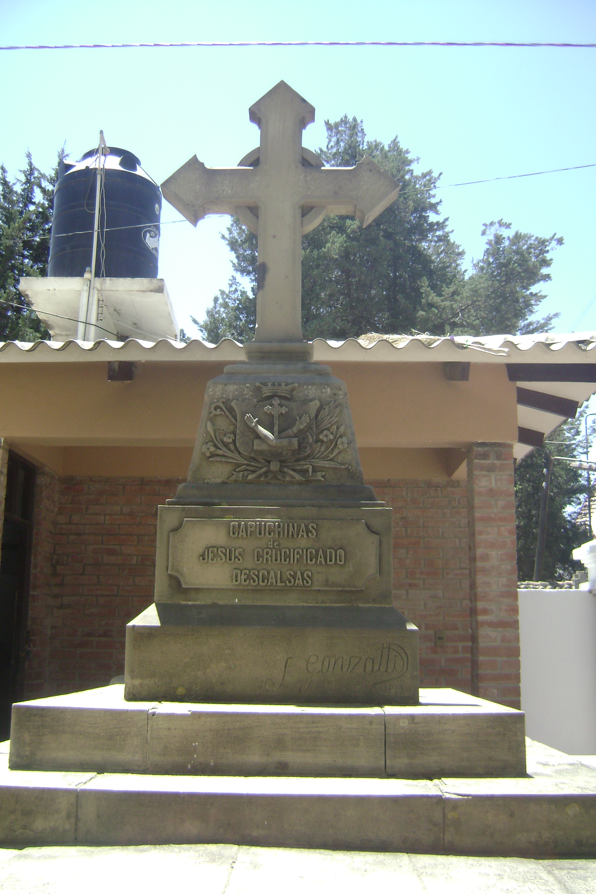 Esta tumba se encuentra actualmente en el Cementerio General de Cochabamba/Bolivia